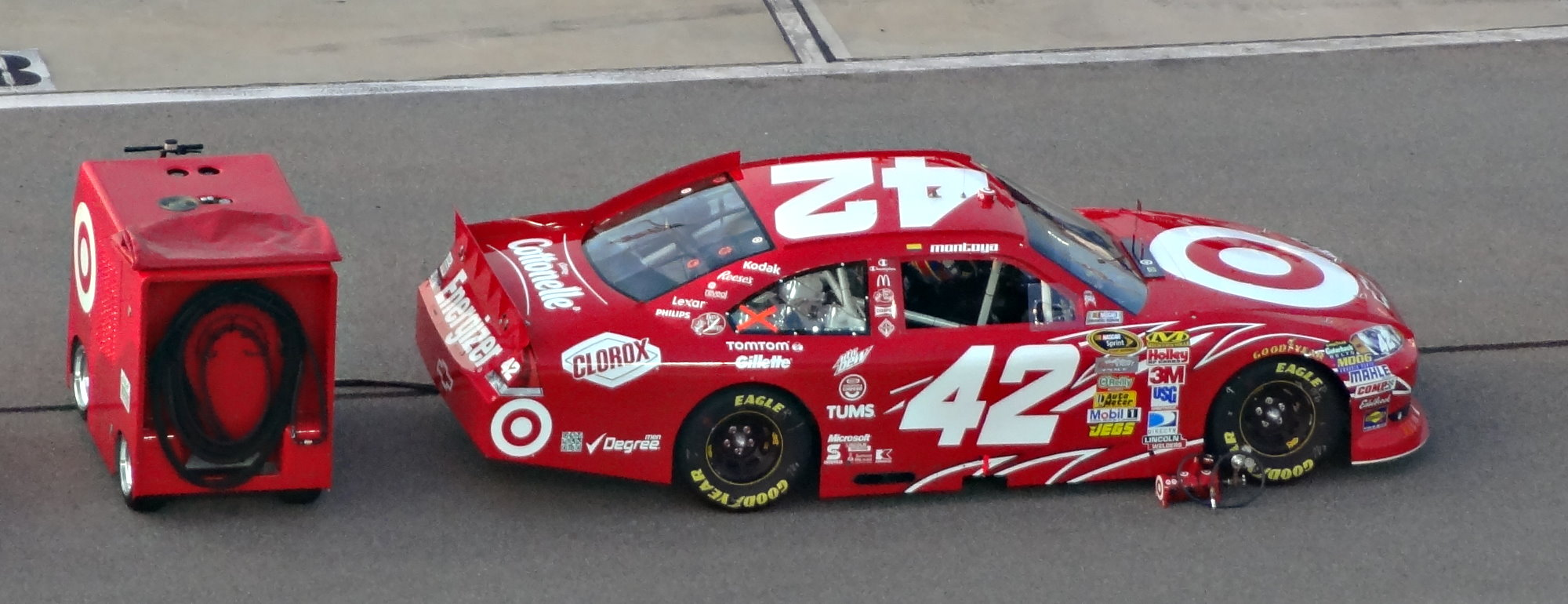 Stockcar von Montoya vor dem Start des Septemberrennens in Richmond, 2011.